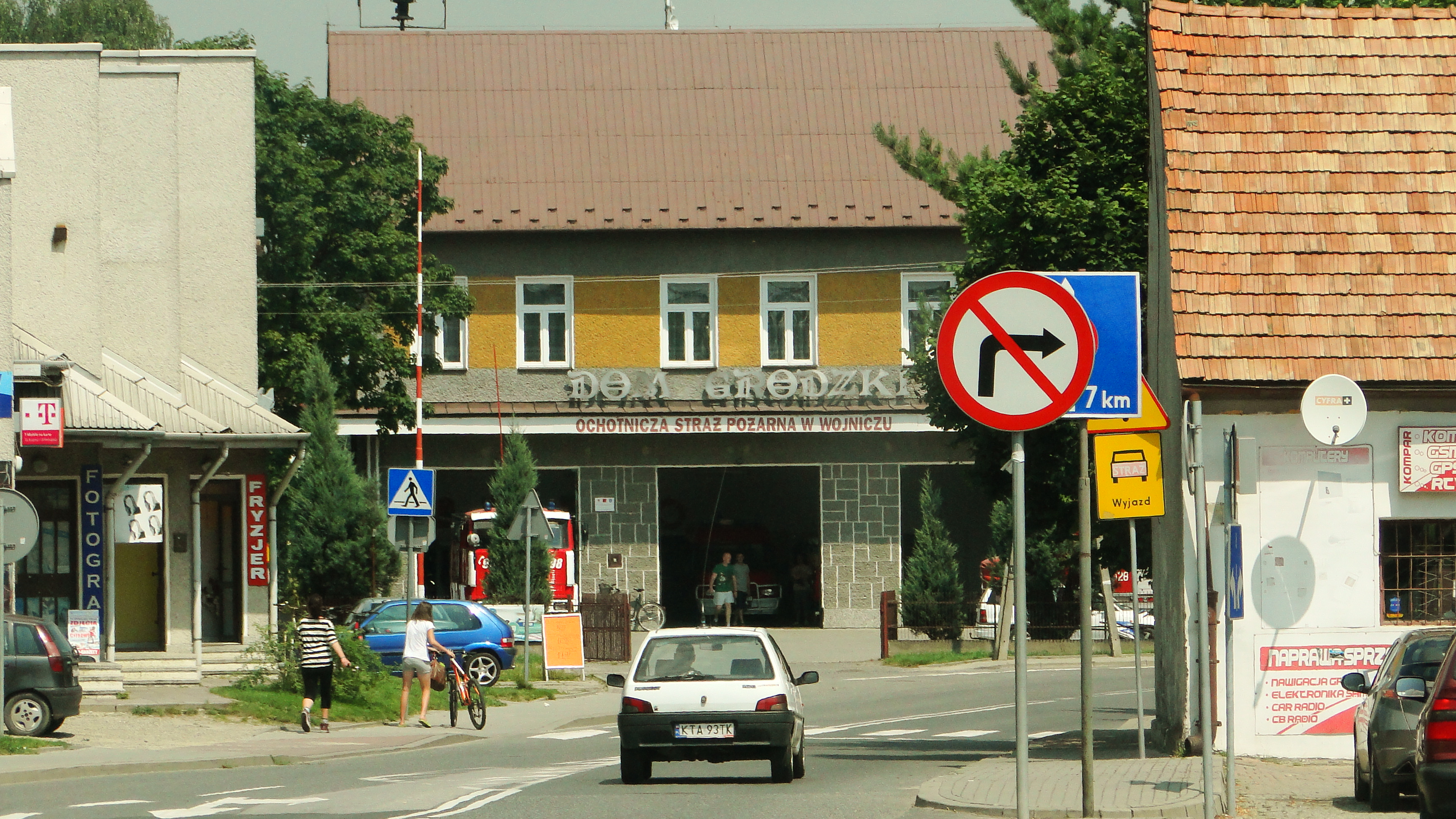 Dom Strażaka w Wojniczu